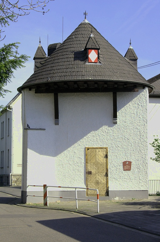 Ehemaliger Wachturm der Stadtmauer von Engers aus dem Jahr 1357. Der Turm diente auch als Polizeigefängnis. Er wurde 1979 restauriert.